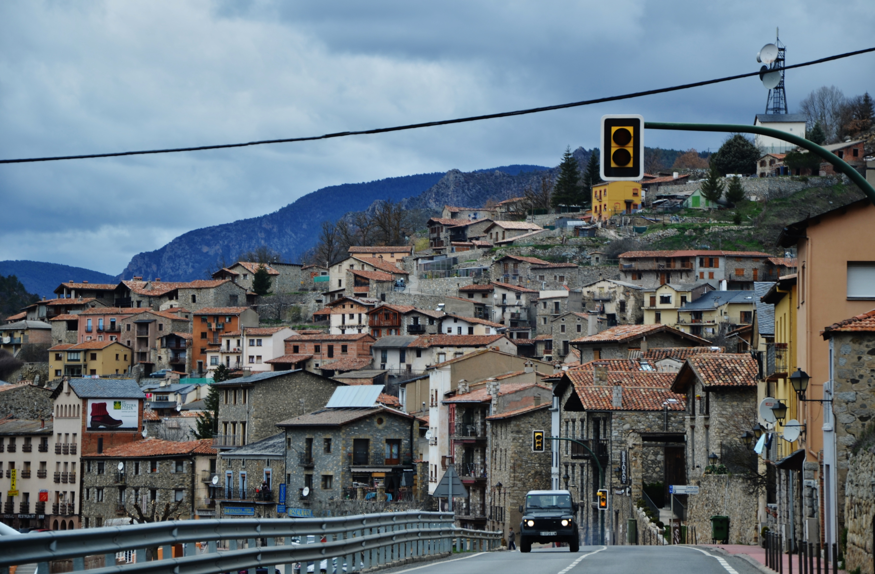 Montella i Martinet, Baixa Cerdanya